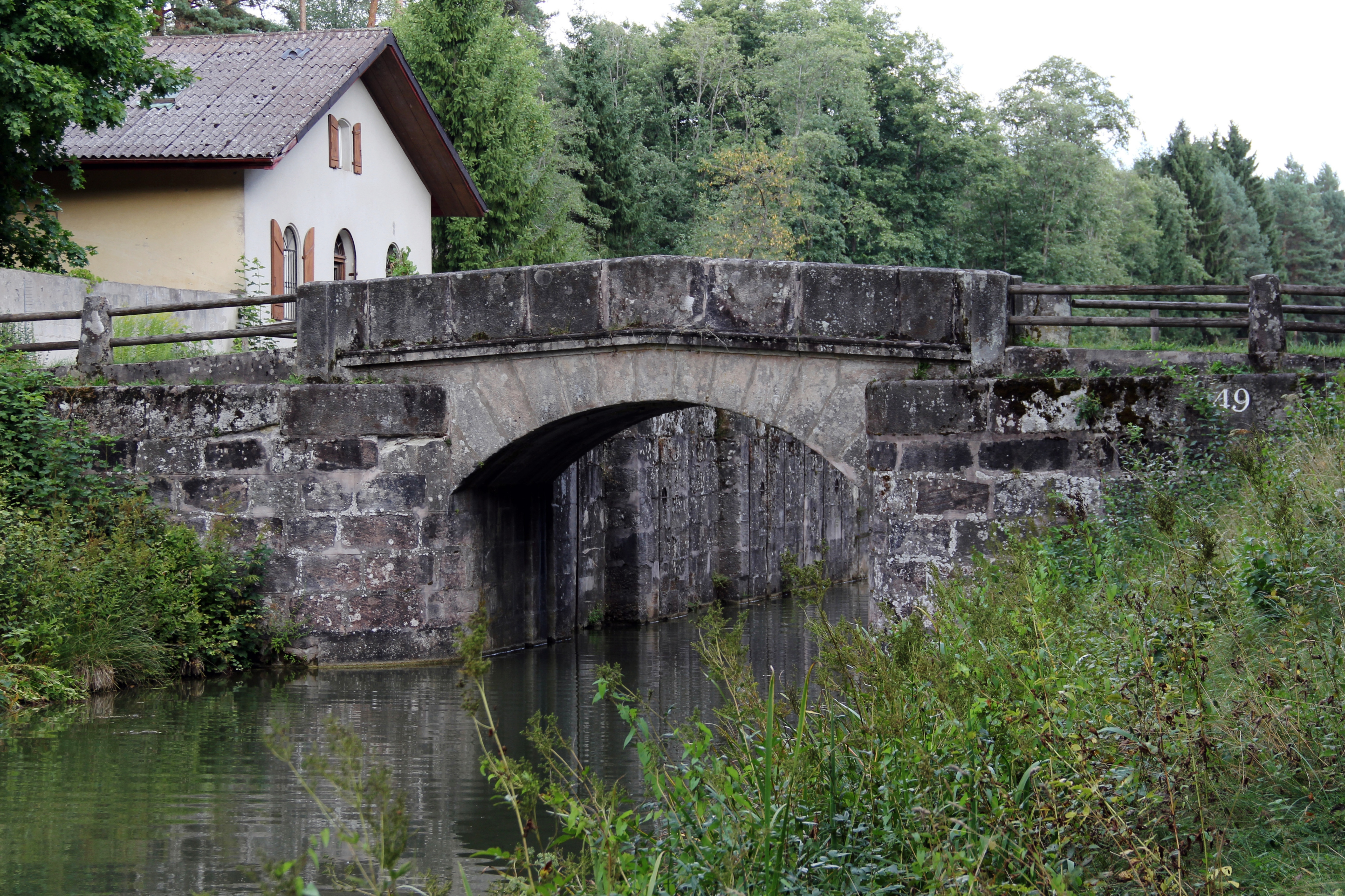 Schleuse 49, Ludwig-Donau-Main-Kanal